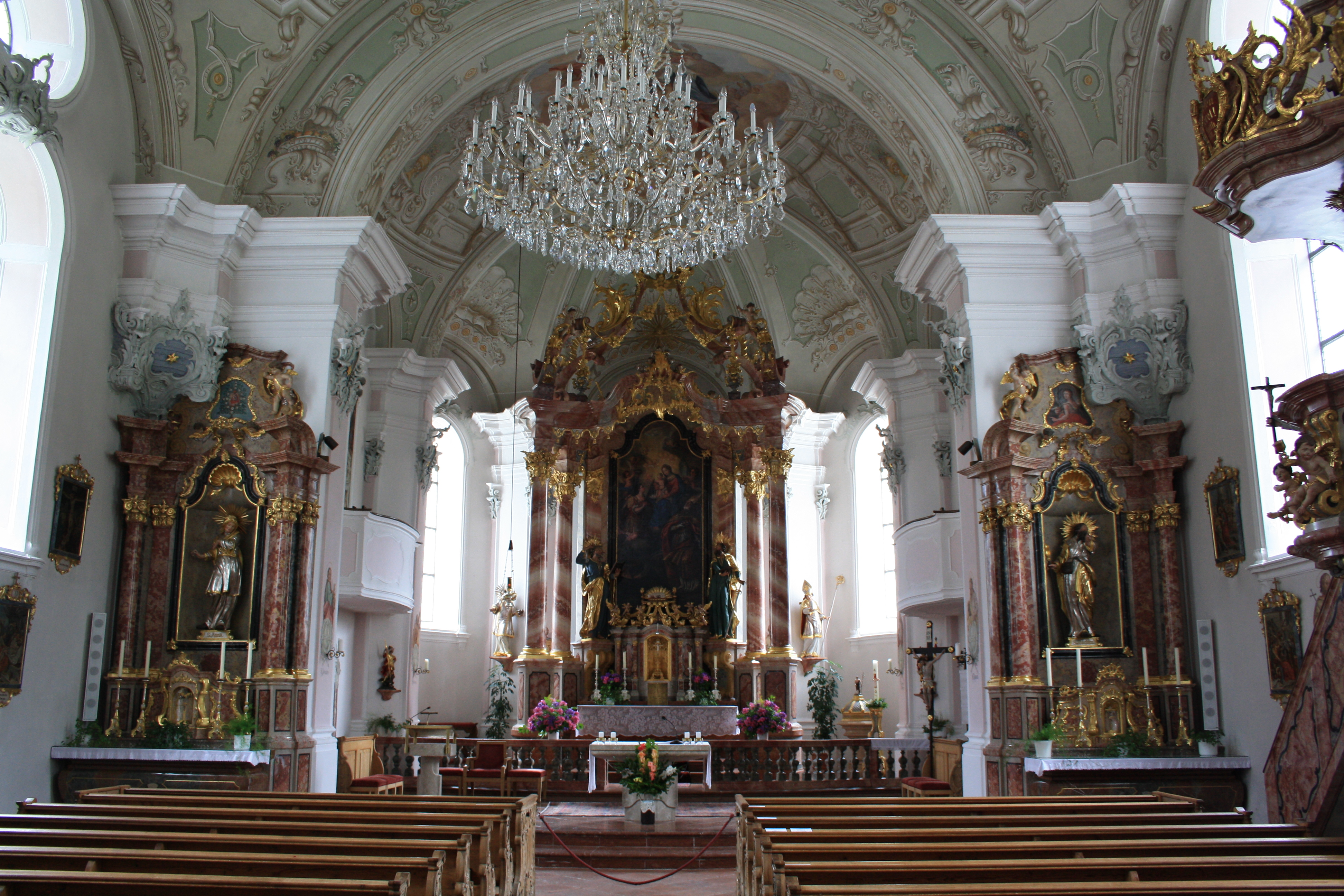 Kirchenschiff der Pfarrkirche